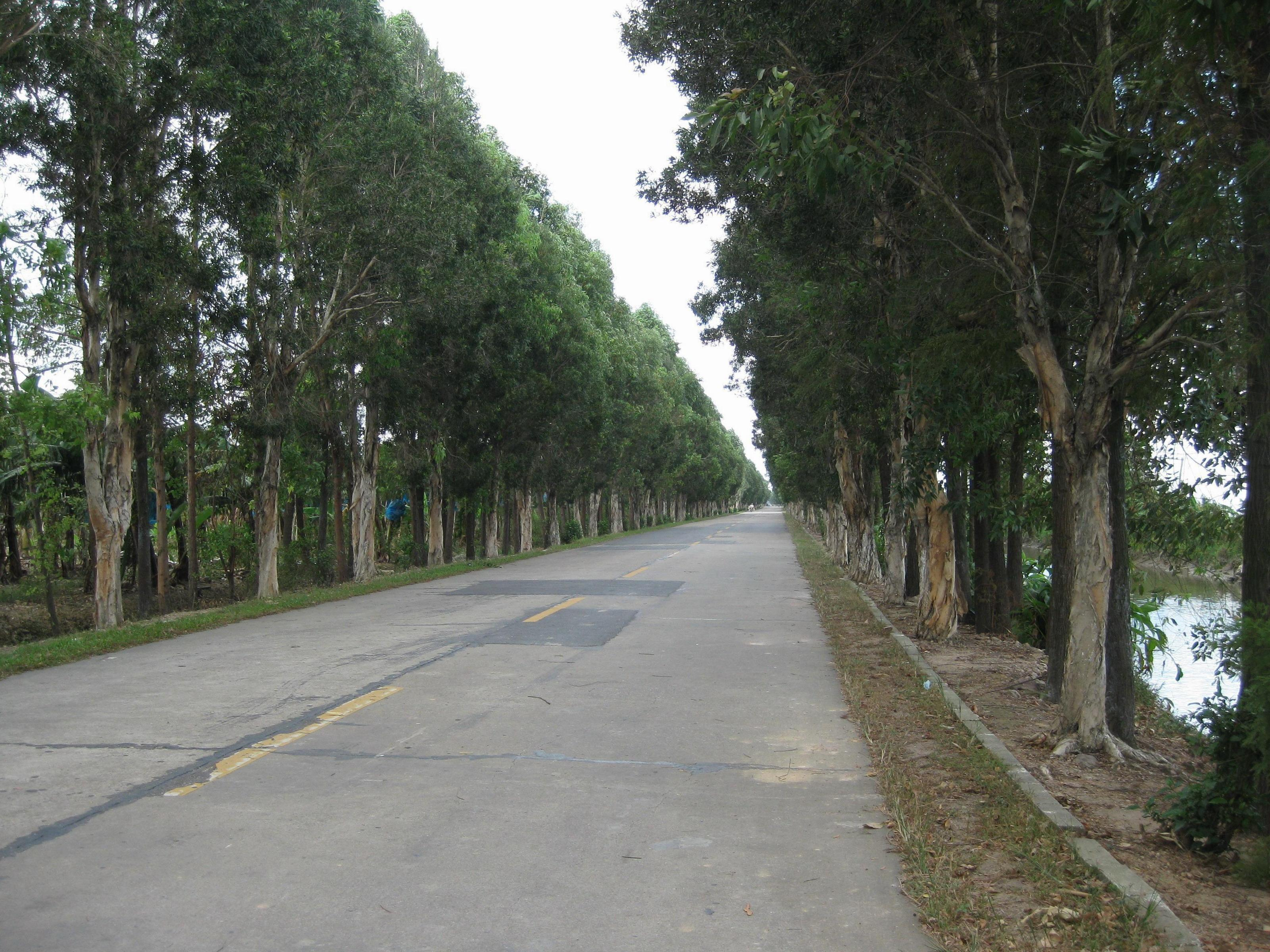 X538新會三江段